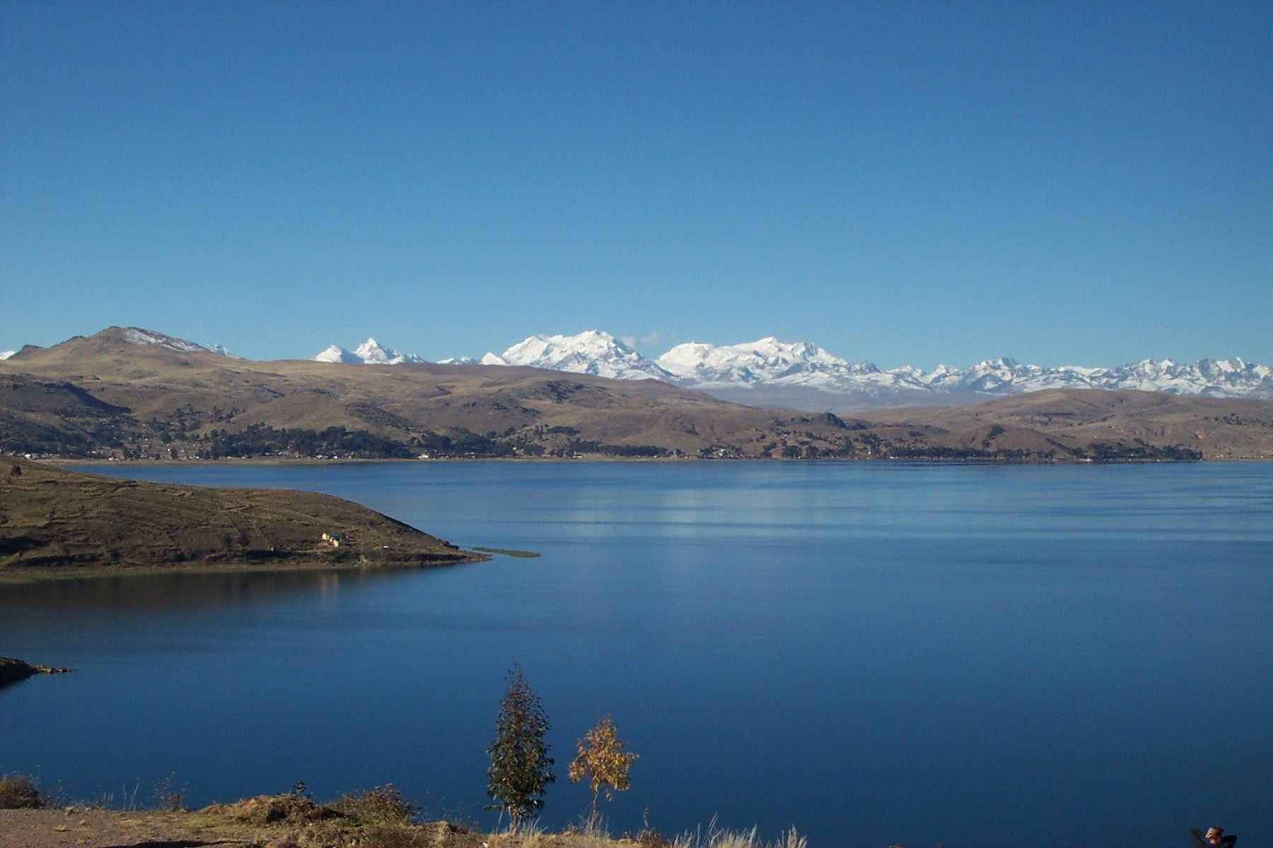 Lake Titicaca, Cordillera Real, Bolivia. Eigen foto. zomer 2002